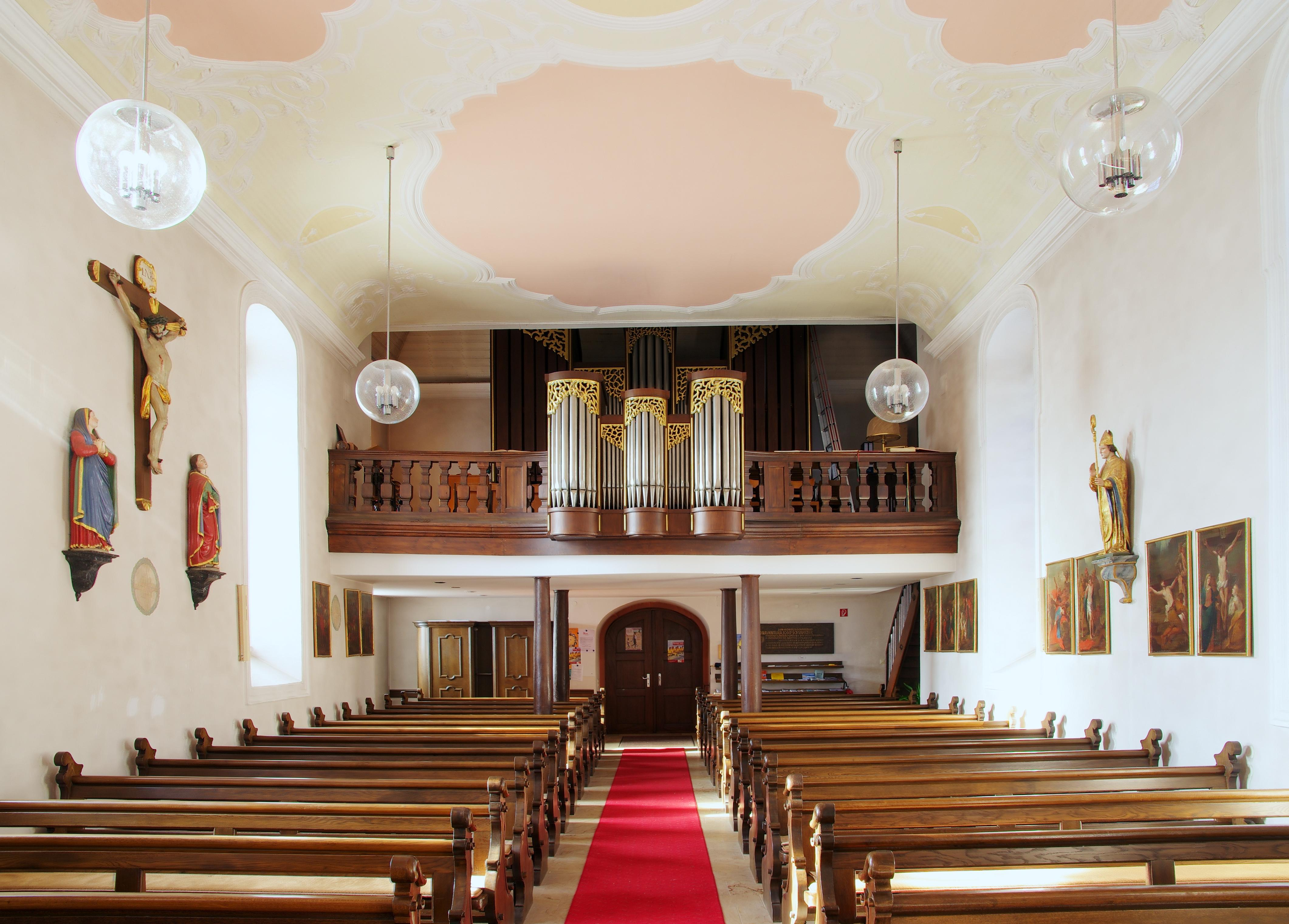 St. Hilarius